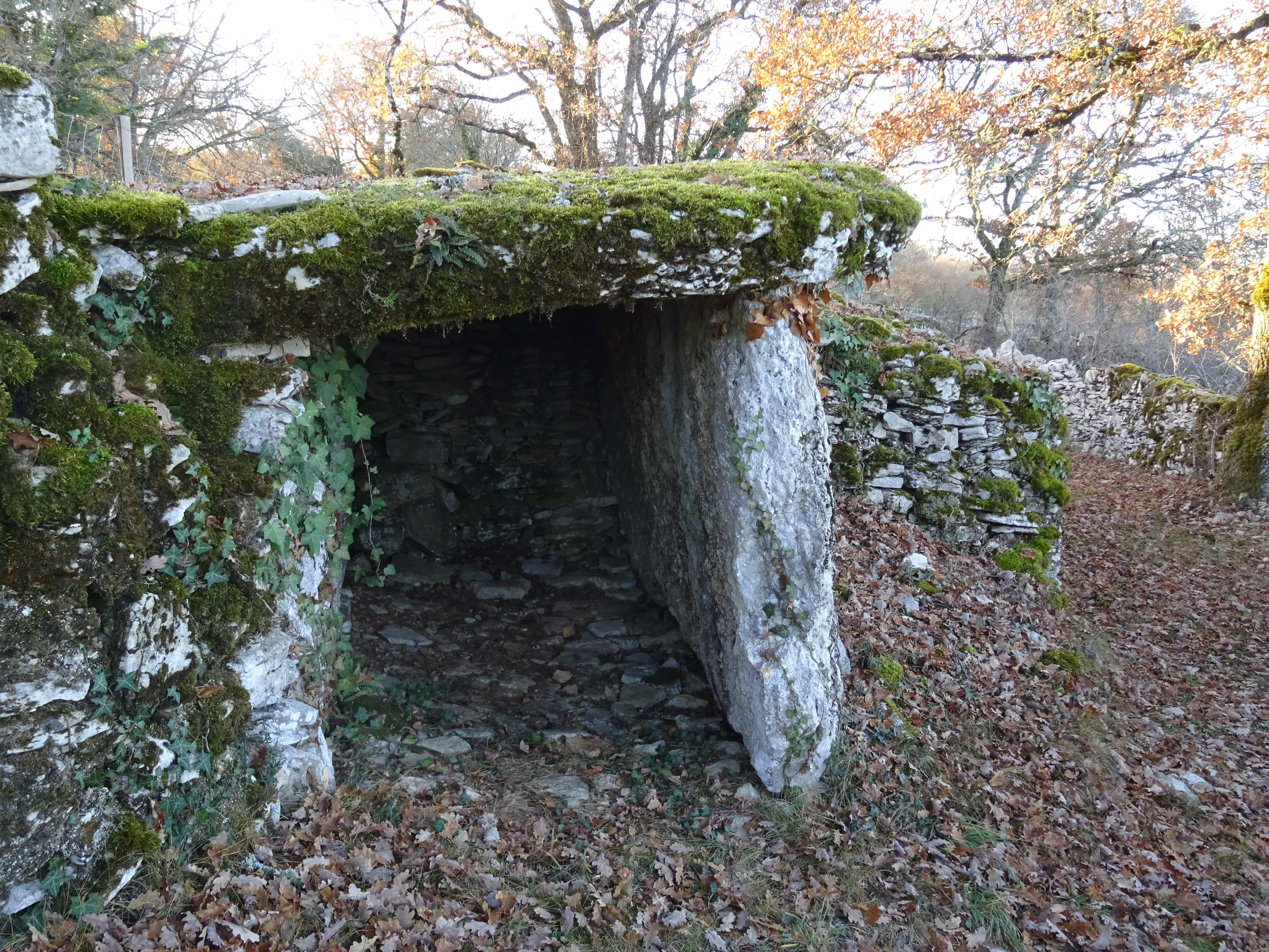 Dolmen de Place du Sol à Espédaillac (Lot, France)